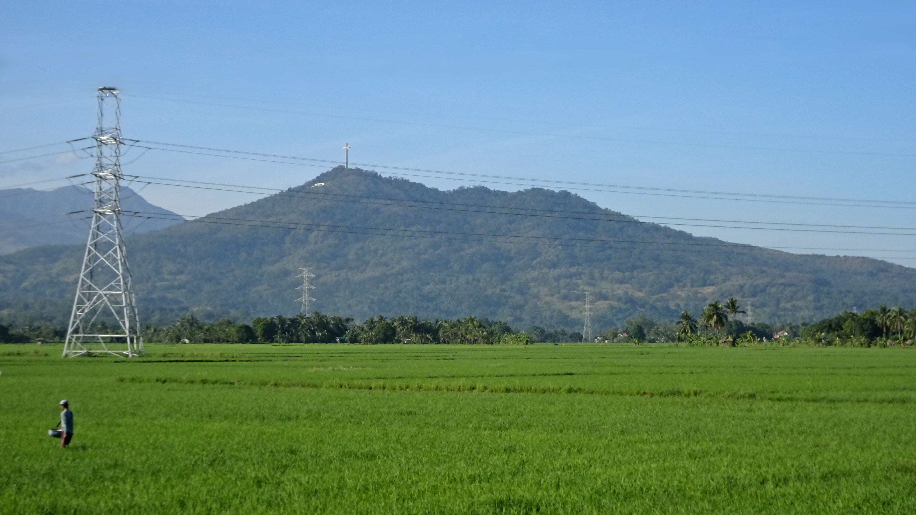 Mount Samat, Bataan, Philippines